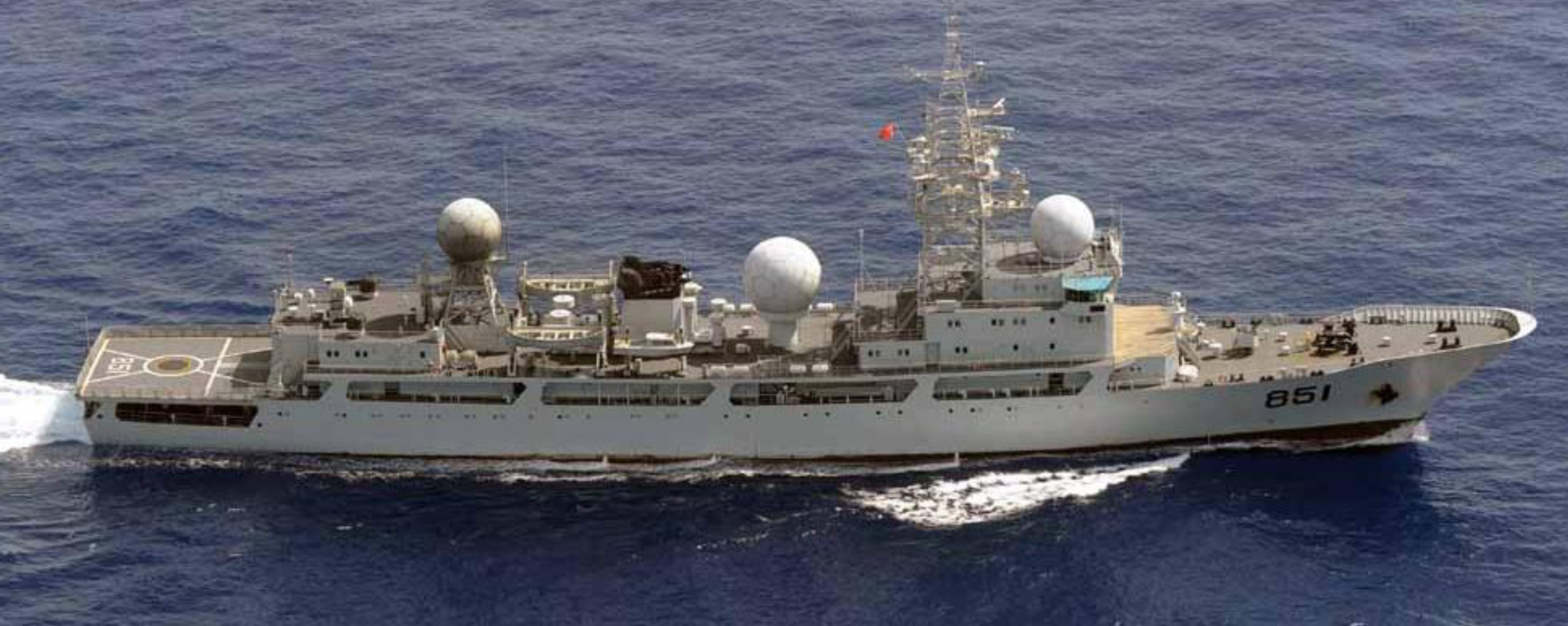 ５月１４日（月）午後２３時頃から午後２４時頃にかけて、海上自衛隊第５航空群（那覇）所属「Ｐ－３Ｃ」、第６護衛隊「たかなみ」（横須賀）及び第１５護衛隊「はまぎり」（大湊）が、宮古島の北東約１１０ｋｍの海域を太平洋から東シナ海に向けて北西進する中国海軍ジャンカイII級フリゲート２隻及びドンディアオ級情報収集艦１隻を確認した。 なお、これら３隻の艦艇は、４月２９日（日）正午頃、屋久島の西約４３０ｋｍの海域を東シナ海から太平洋に向けて東進し、その後、沖ノ鳥島東約７００ｋｍの海域において無人航空機の飛行訓練を行っていたことが確認されている。